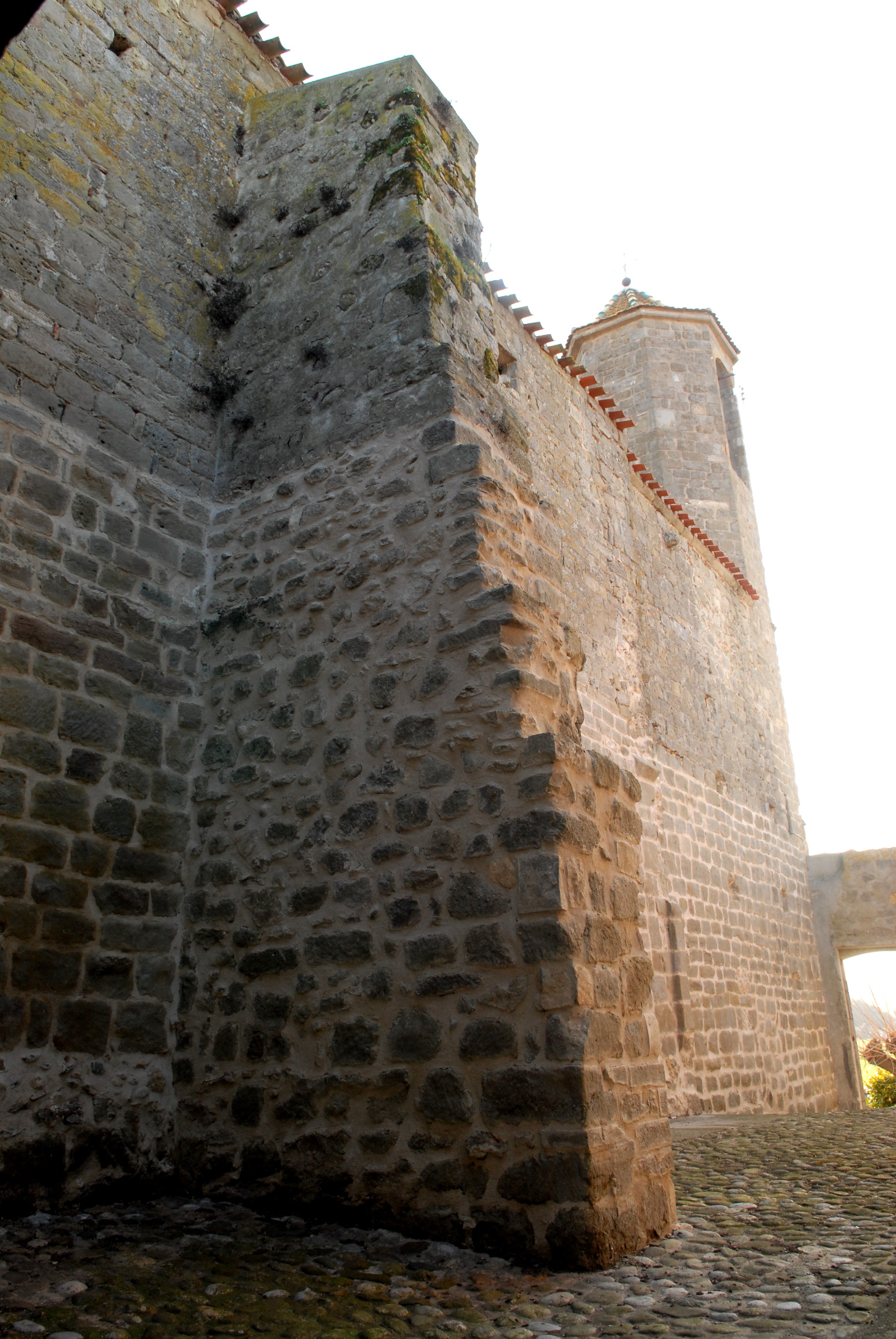 Contrefort typique en escaliers du gothique méridional de l'église Saint Germain d'Alairac (11)